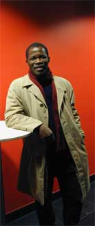 Grafik-Designer Gilbert G. Groud im November 2006 in Basel, Schweiz